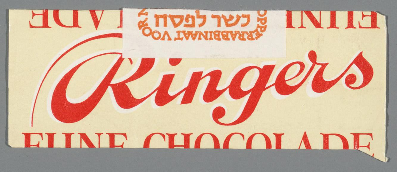 Lichtgele wikkel van Ringers chocolade met rode letters bedrukt. Koosjer voedsel.